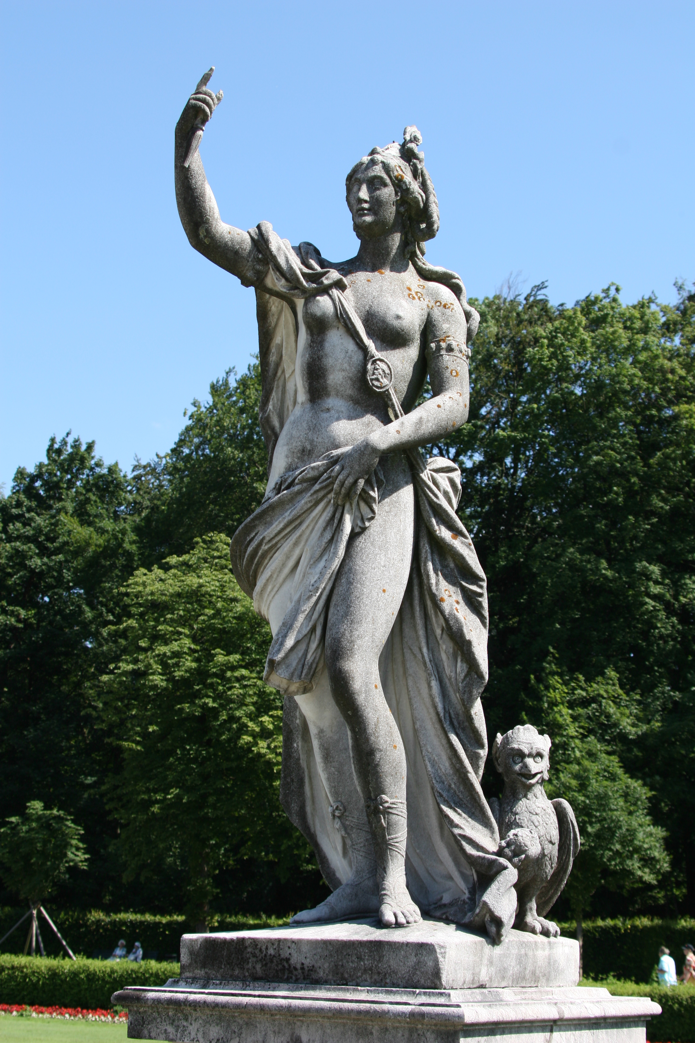 Aufnahme der Athena Statue aus dem Großen Parterre im Schlosspark Schloss NymphenburgAthena Statue, Großes Parterre Schloßpark Nymphenburg, München, Deutschland